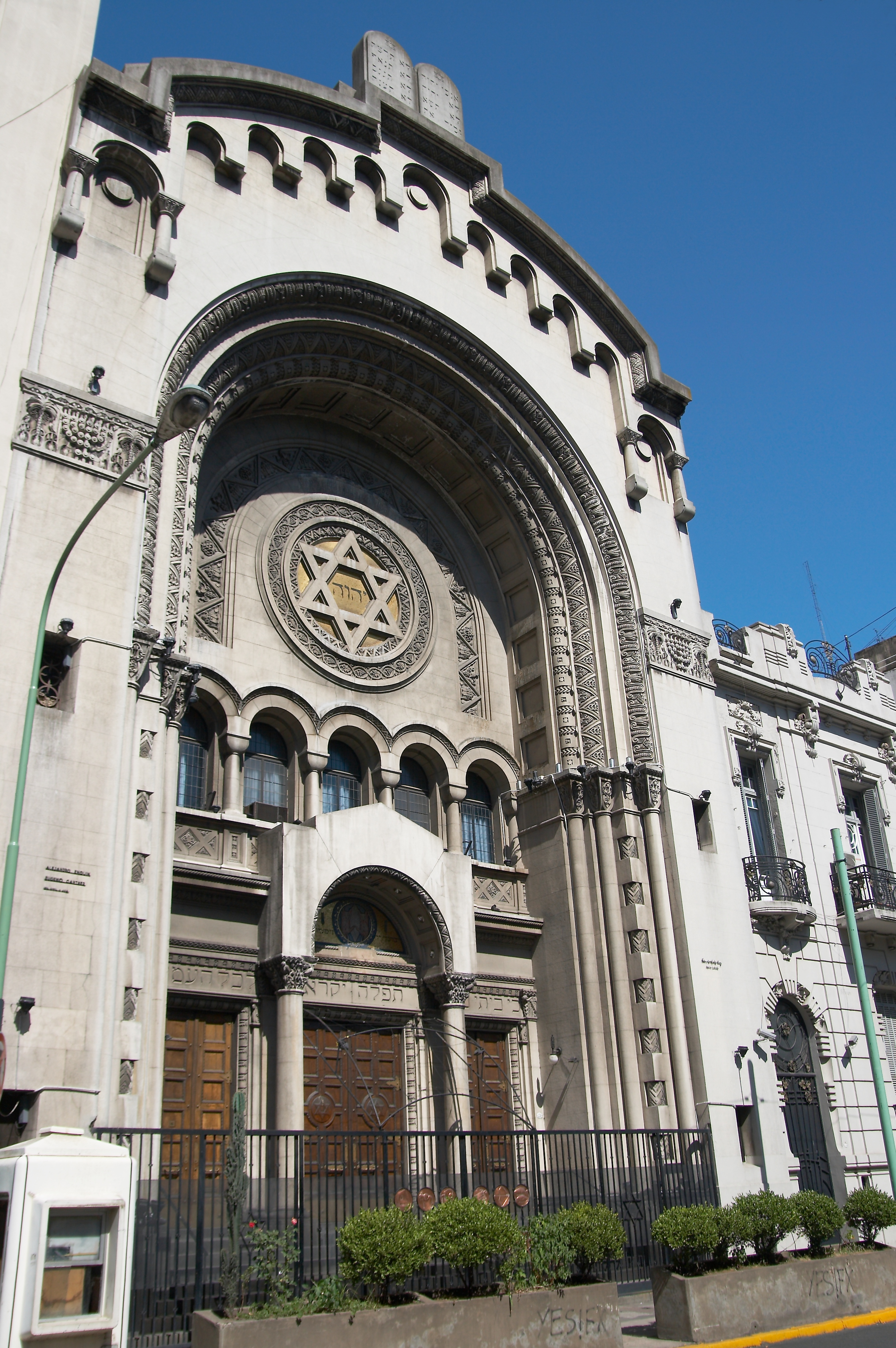 Sinagoga de la Congregación Israelita Argentina, Libertad 779, barrio de San Nicolás, ciudad de Buenos Aires, Argentina.